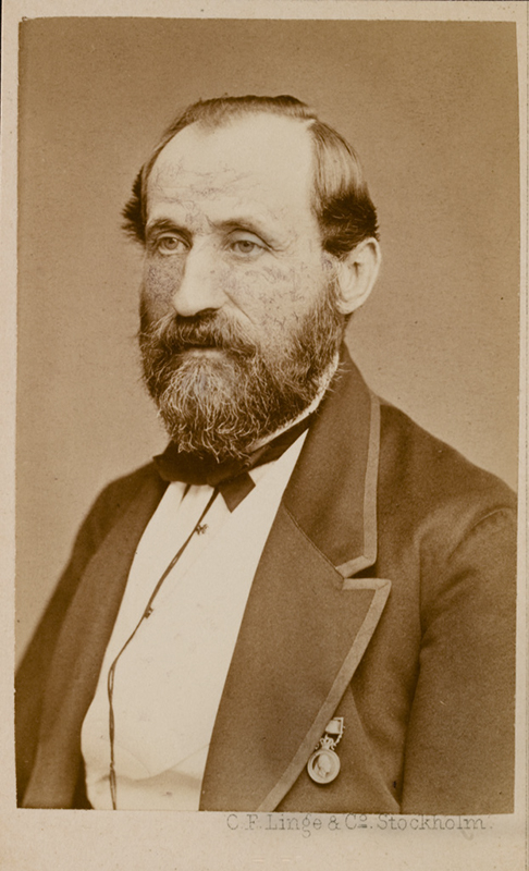 Depicted person: Lars Gabriel Horngren, SIDENFABRIKÖR